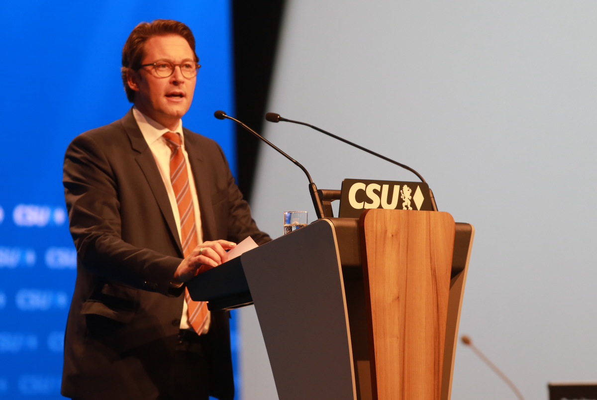 Andreas Franz Scheuer, deutscher Politiker (CSU), u.a. Generalsekretär der CSU Hier während seiner Eröffnungsrede auf dem CSU-Parteitag am 4.11.2016 in München.